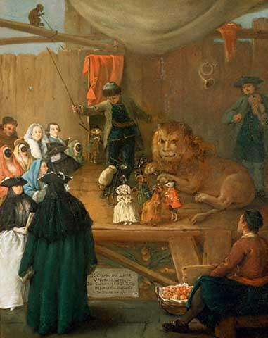 Bildbeschreibung des Museums (Italian)